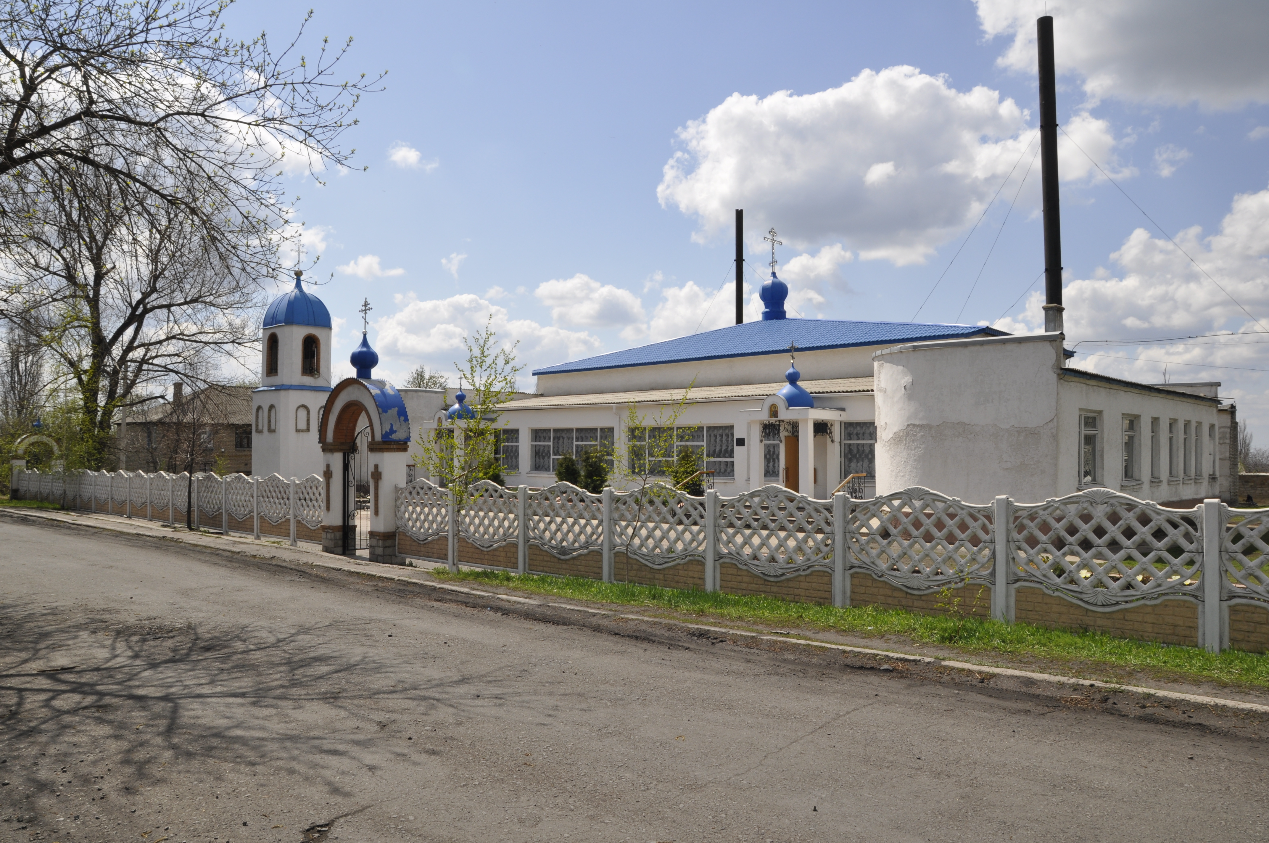 Снежное